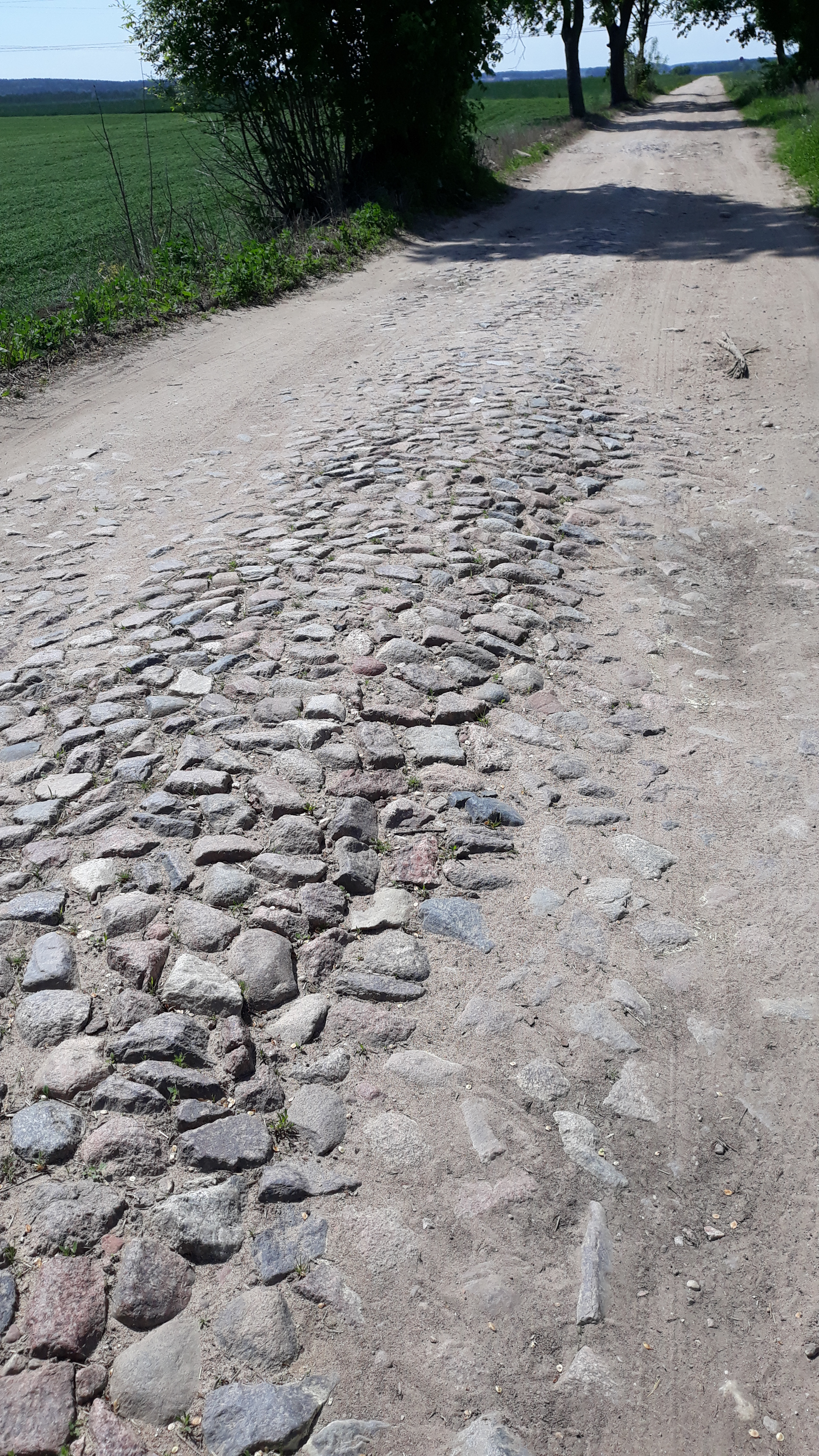 Брукаванка на аколіцы вёсцы